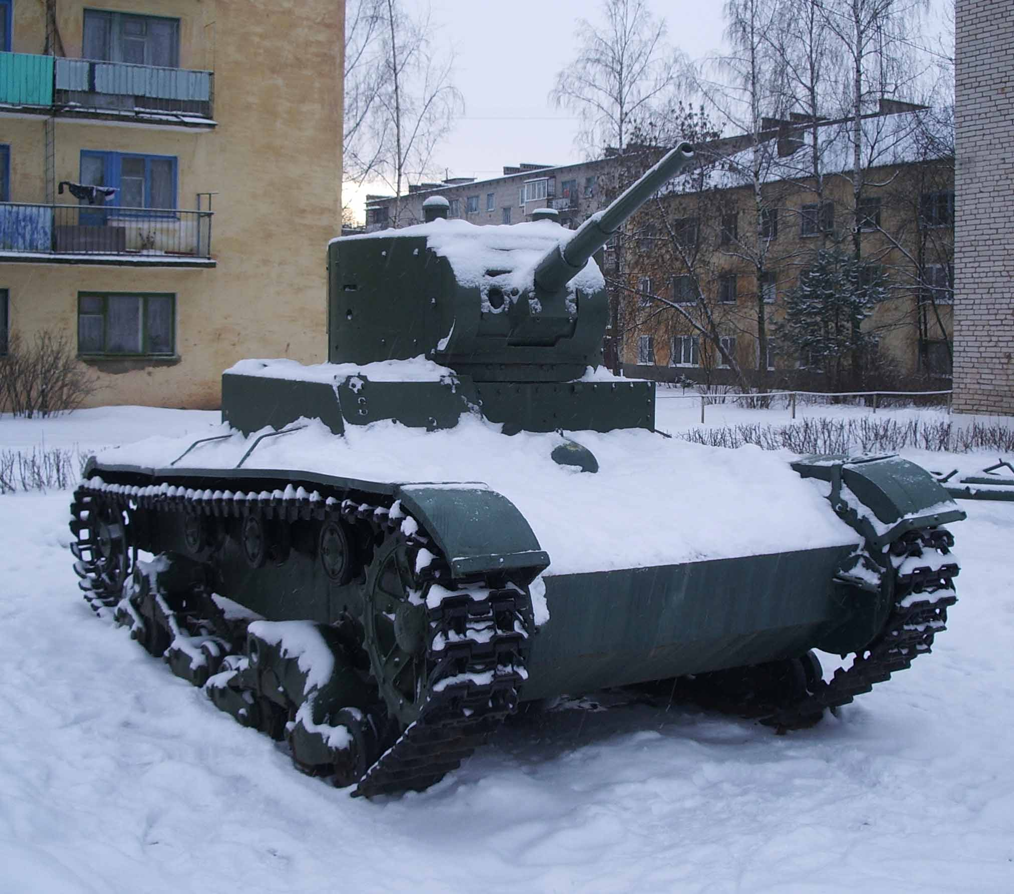 Танк T-26 из деревни Коровитчино Старорусского района Новгородской области. Установлен рядом со зданием Музея северо-западного фронта в Старой Руссе